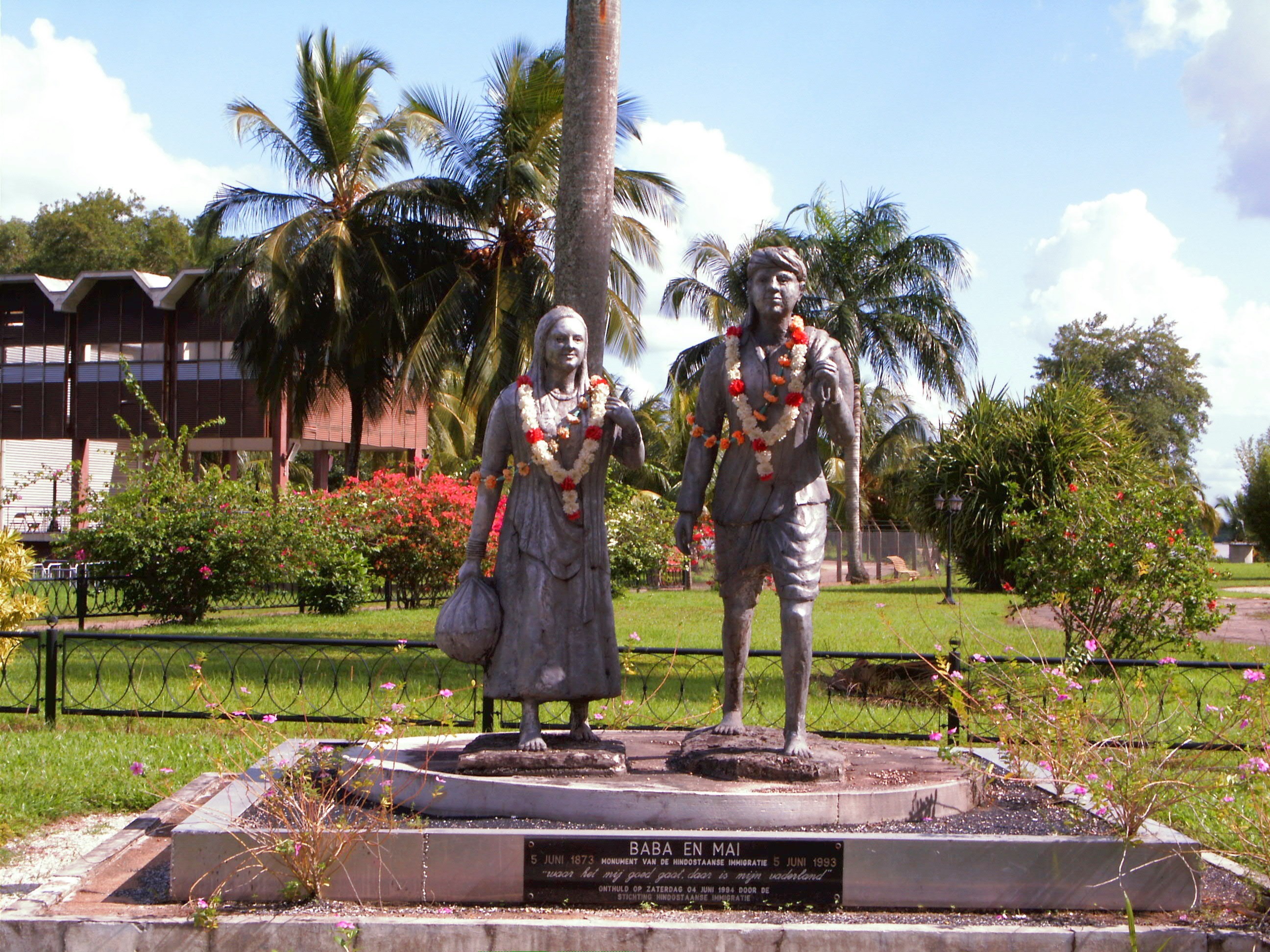 HindustanenDenkmal